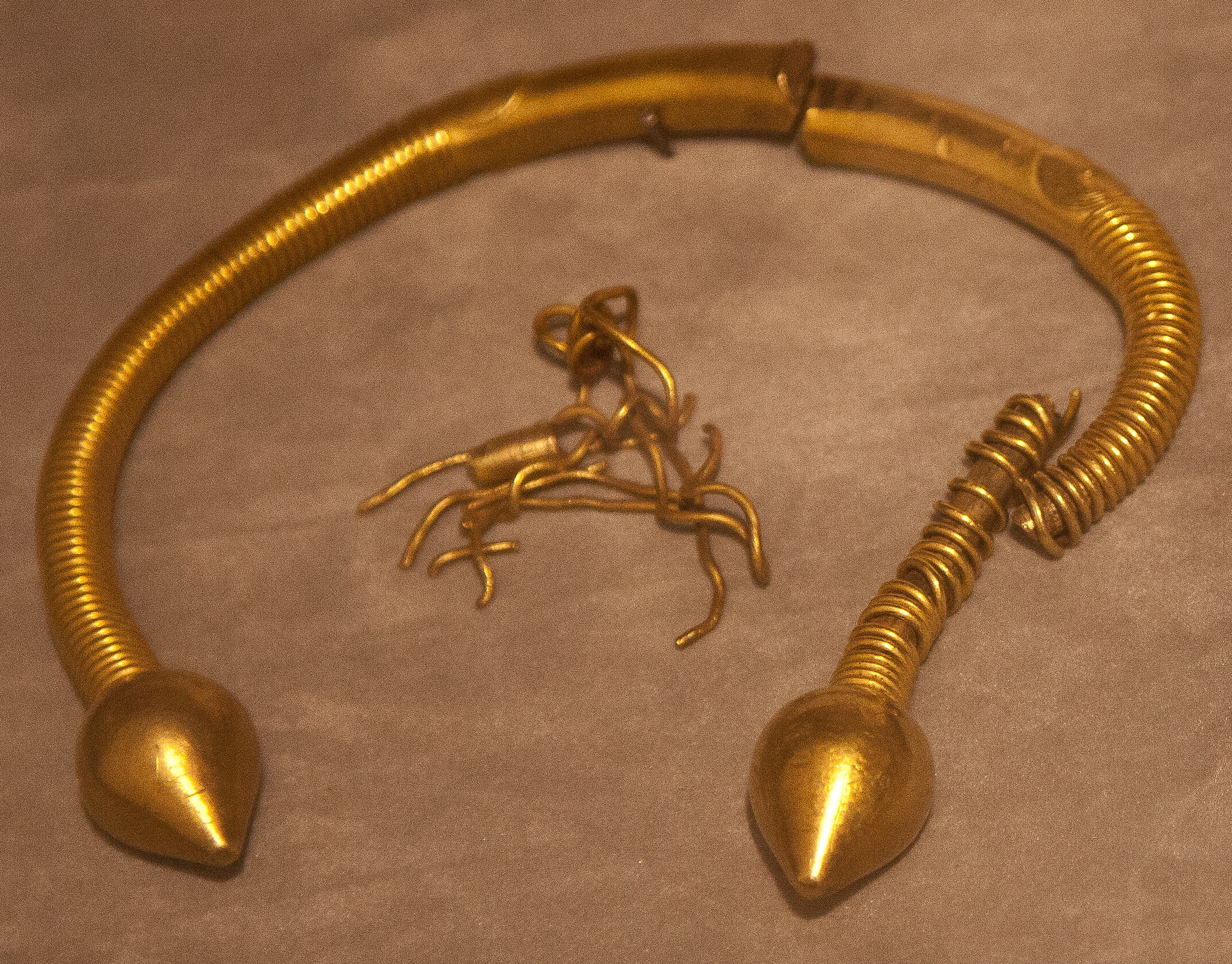 Esquerda: Torques de San Martiño do Porto, Cabanas-Pontedeume, A Coruña Ouro Circa s.I a.C. Dereita: Torques do Orbellido Vimianzo, A Coruña. Ouro. Circa s.I a.C.